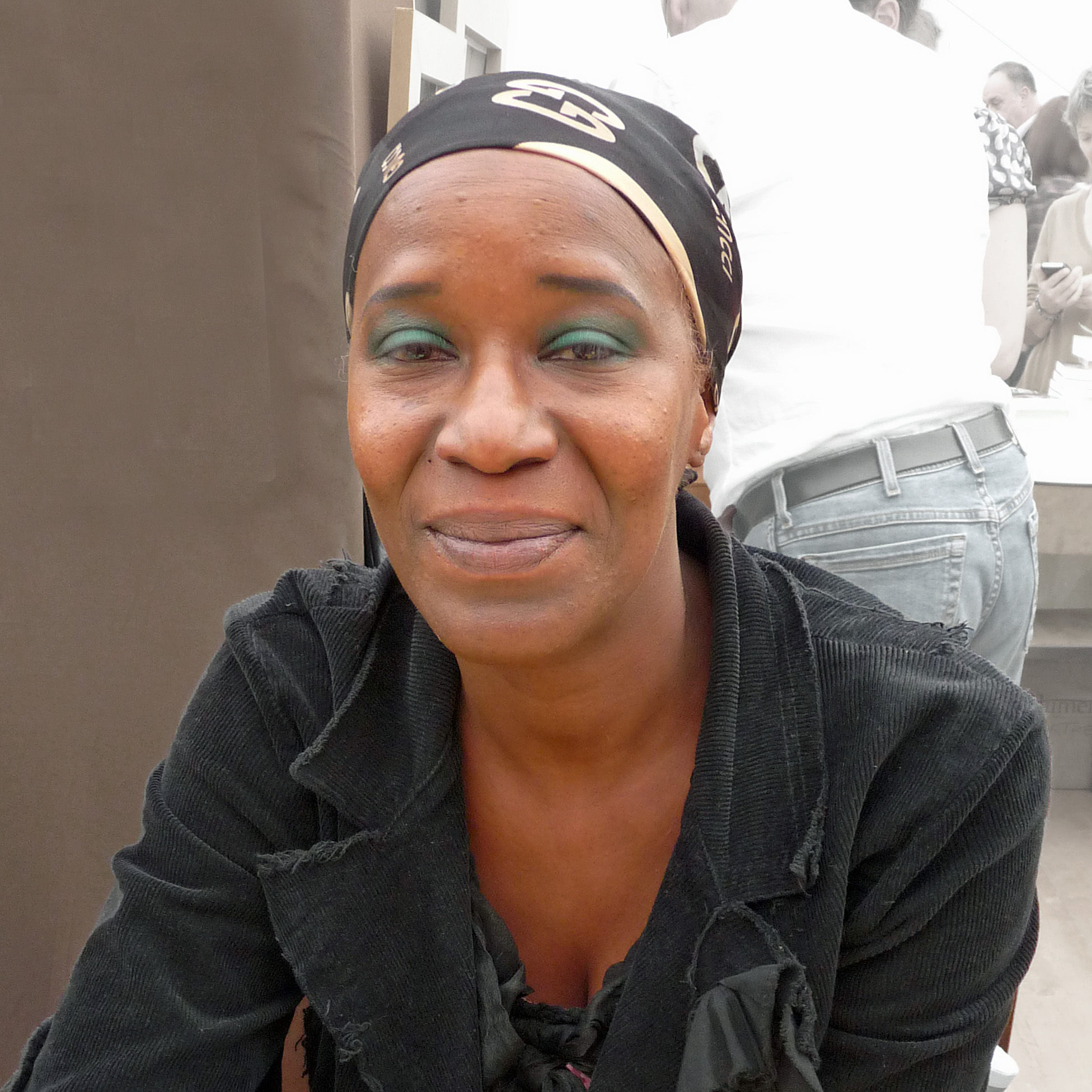 Khadi Hane en dédicace dans le cadre du "Livre sur la Place", Nancy, septembre 2011